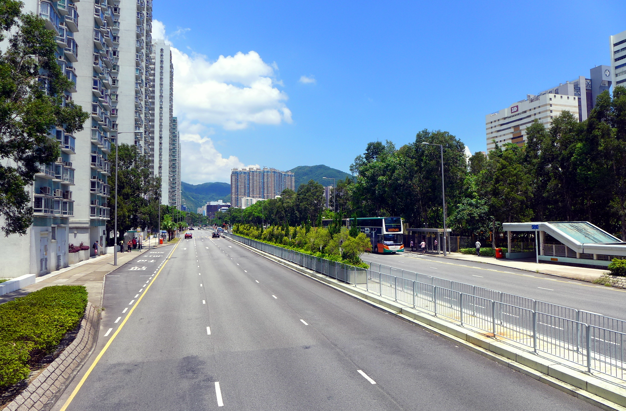 Siu Lek Yuen Road